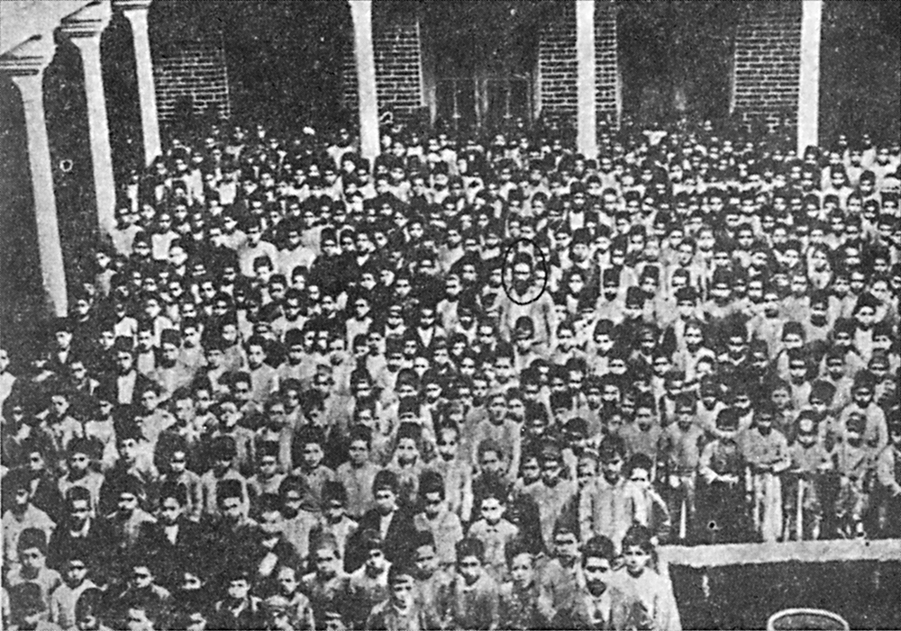 Etudiants juifs au Midrash Talmud Torah (1832-1951) de Bagdad, Irak (date inconnue)